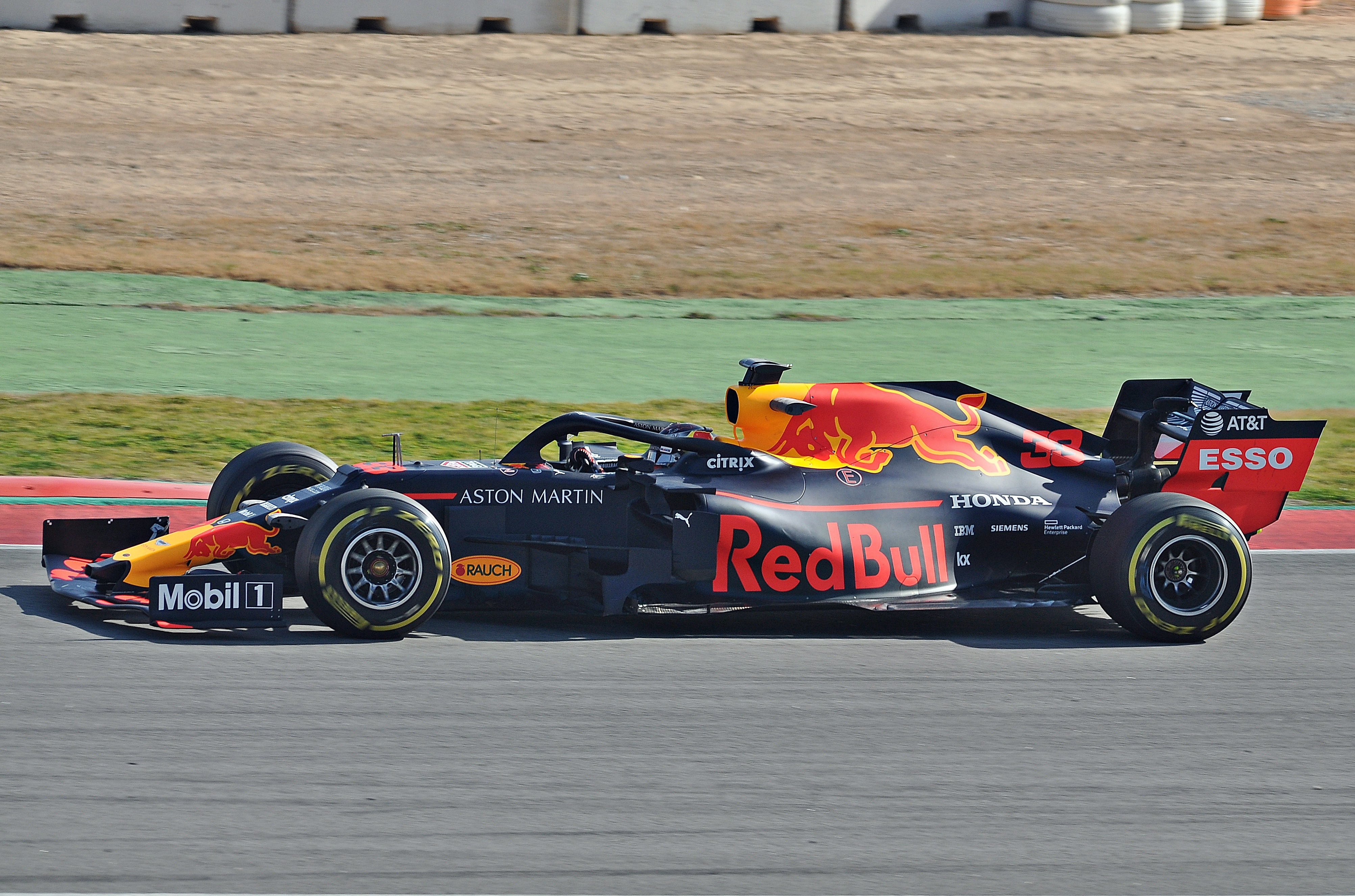 Test Days-Circuito de Catalunya